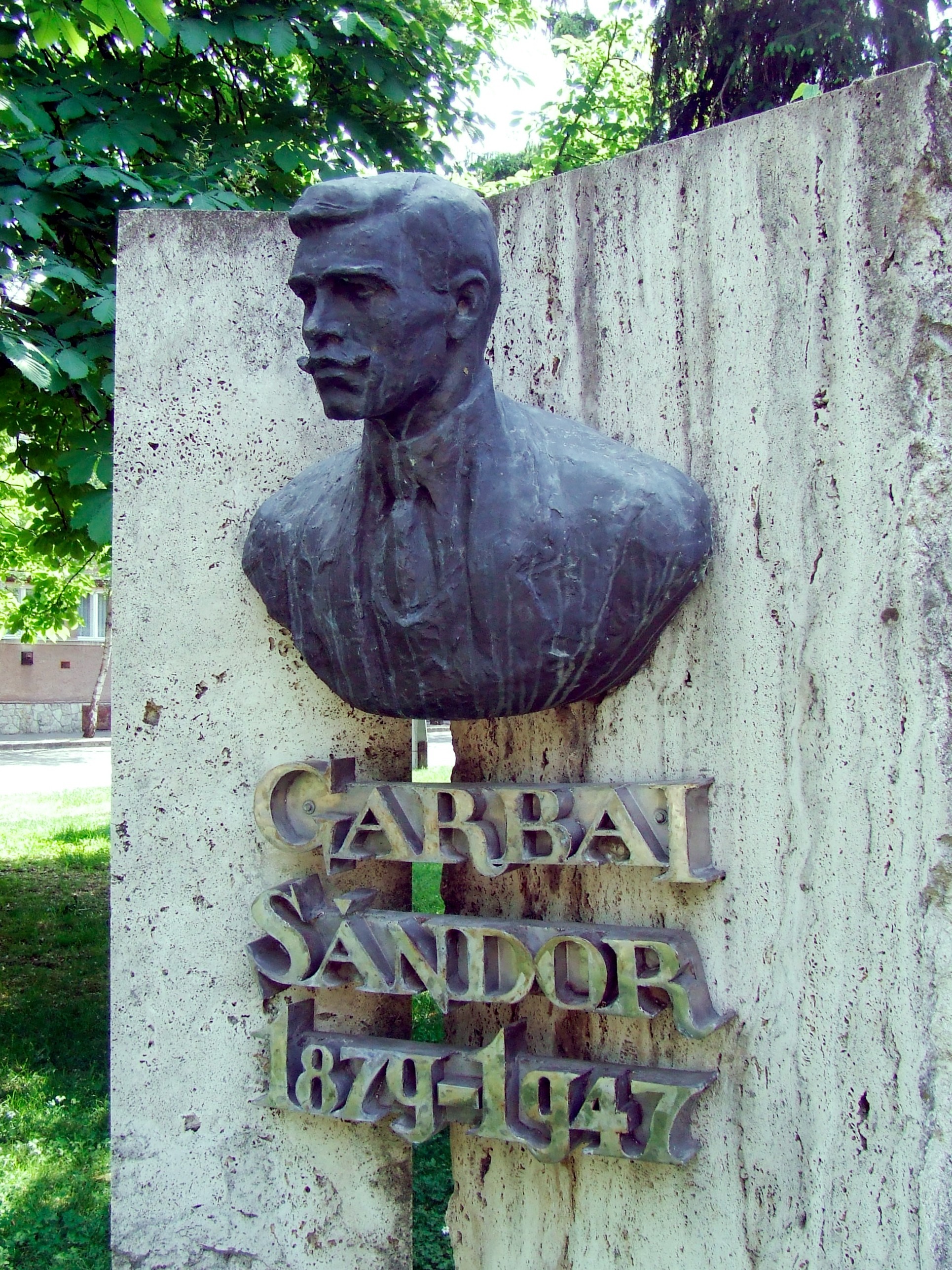 Garbai Sándor szobra Kiskunhalason (bronz, beton). Kalló Viktor szobrászművész és Skoda Lajos építész alkotása (1987)